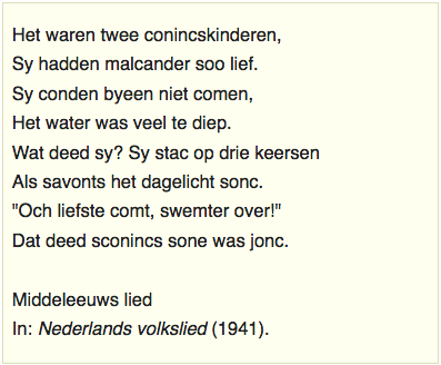 Tekst volksliedje 'Het waren twee koningskinderen' (oudste vindplaats: 1525). Opgenomen in het liedboek "Nederlands volkslied", samengesteld door Pollmann en Tiggers (1941).